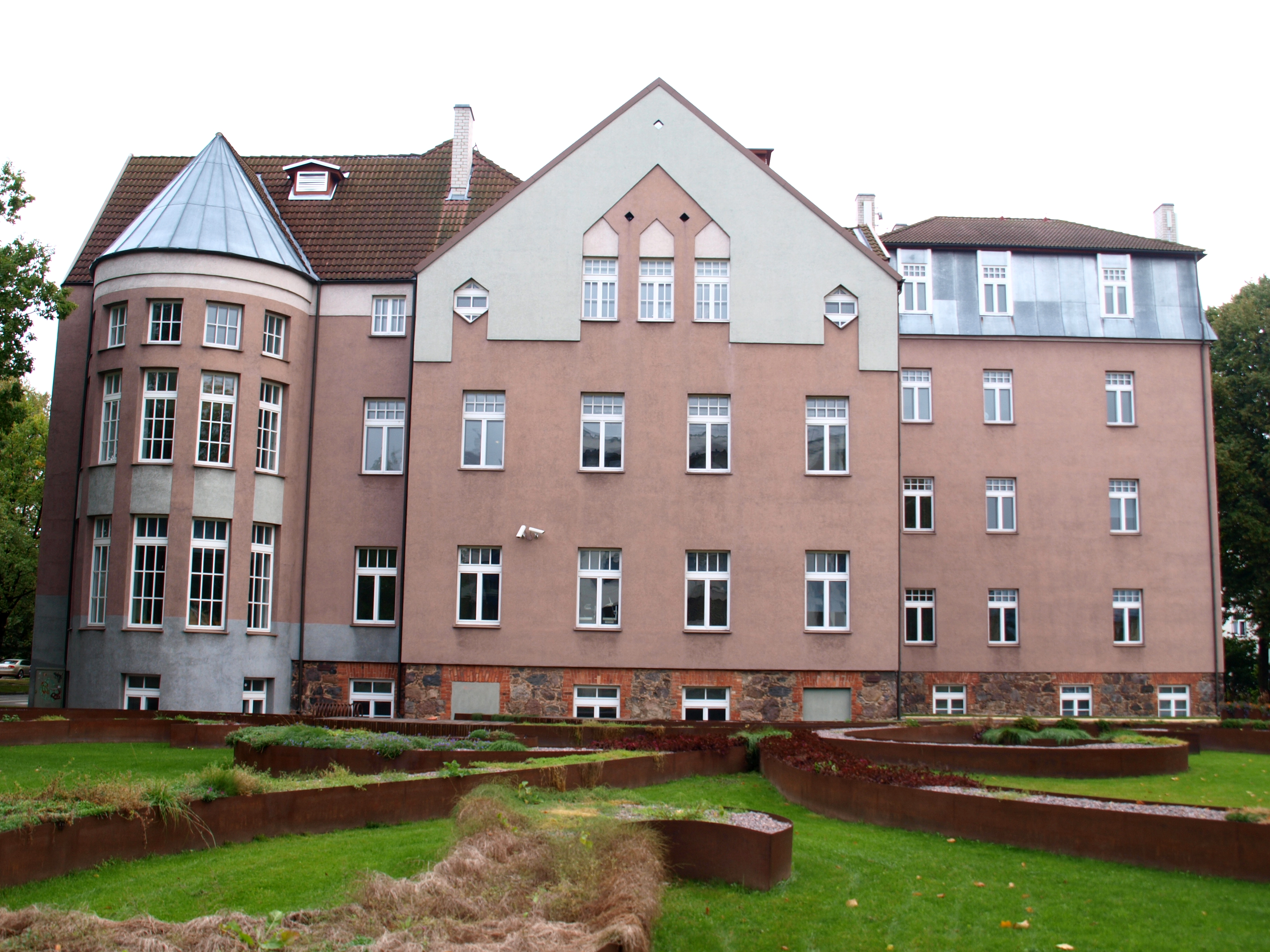 Endine Rostostsevi eraülikooli hoone. Tänapäeval Tartu Ülikooli Juridicum